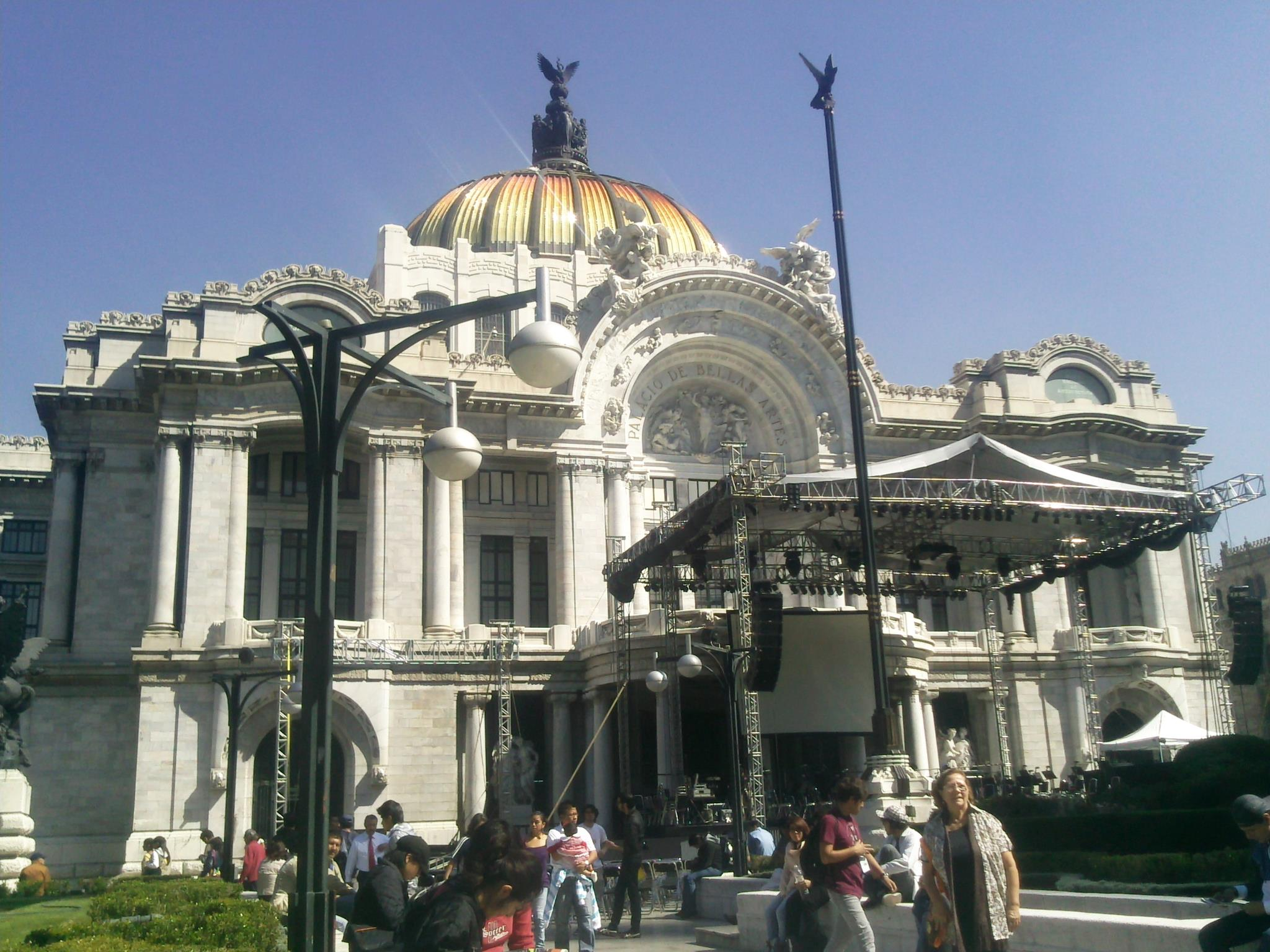 inba2